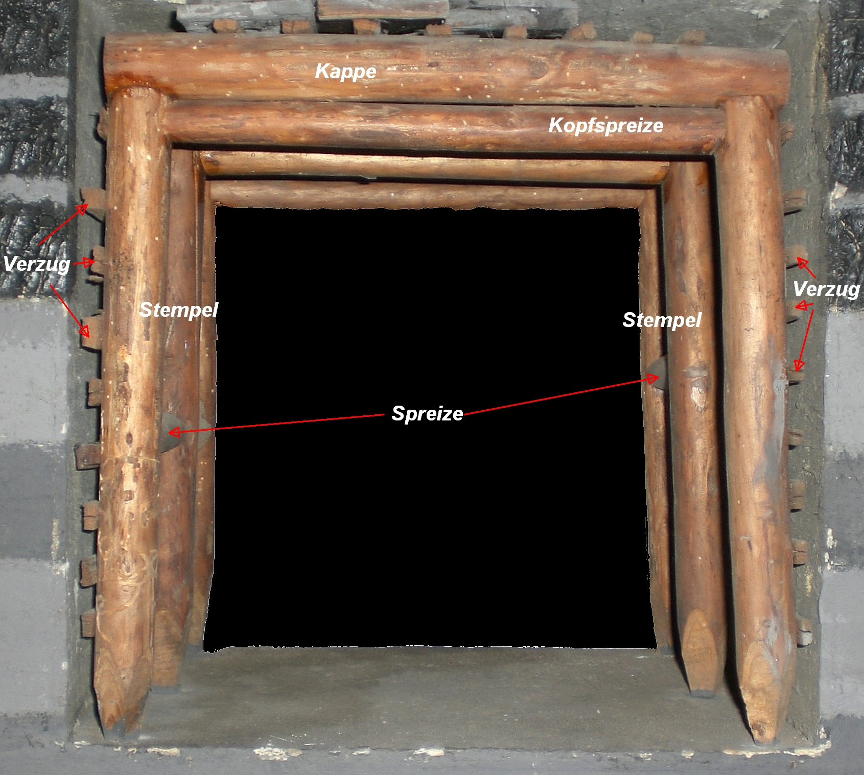 Polnischer Türstock (Modell) mit Bezeichnung der einzelnen Ausbauelemente.